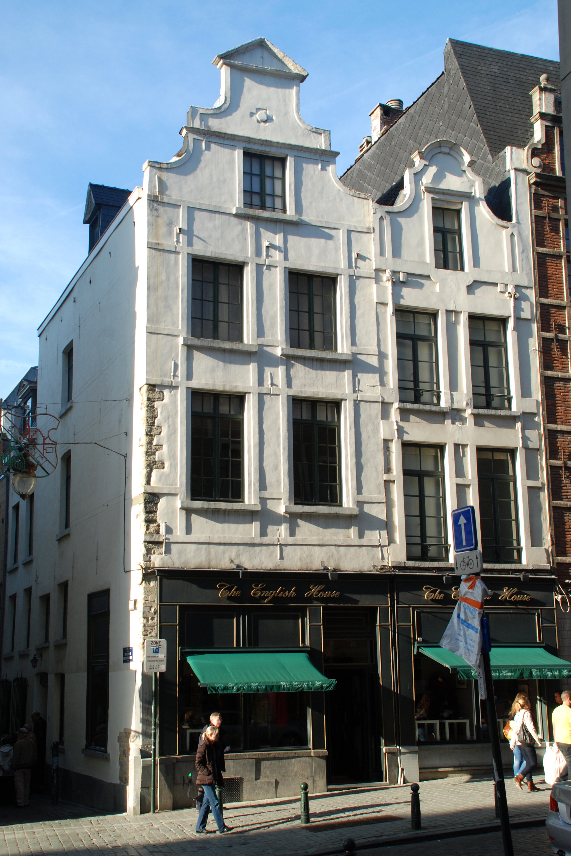 Belgique - Bruxelles - Rue de la Montagne n°46-48 (maisons de style baroque)